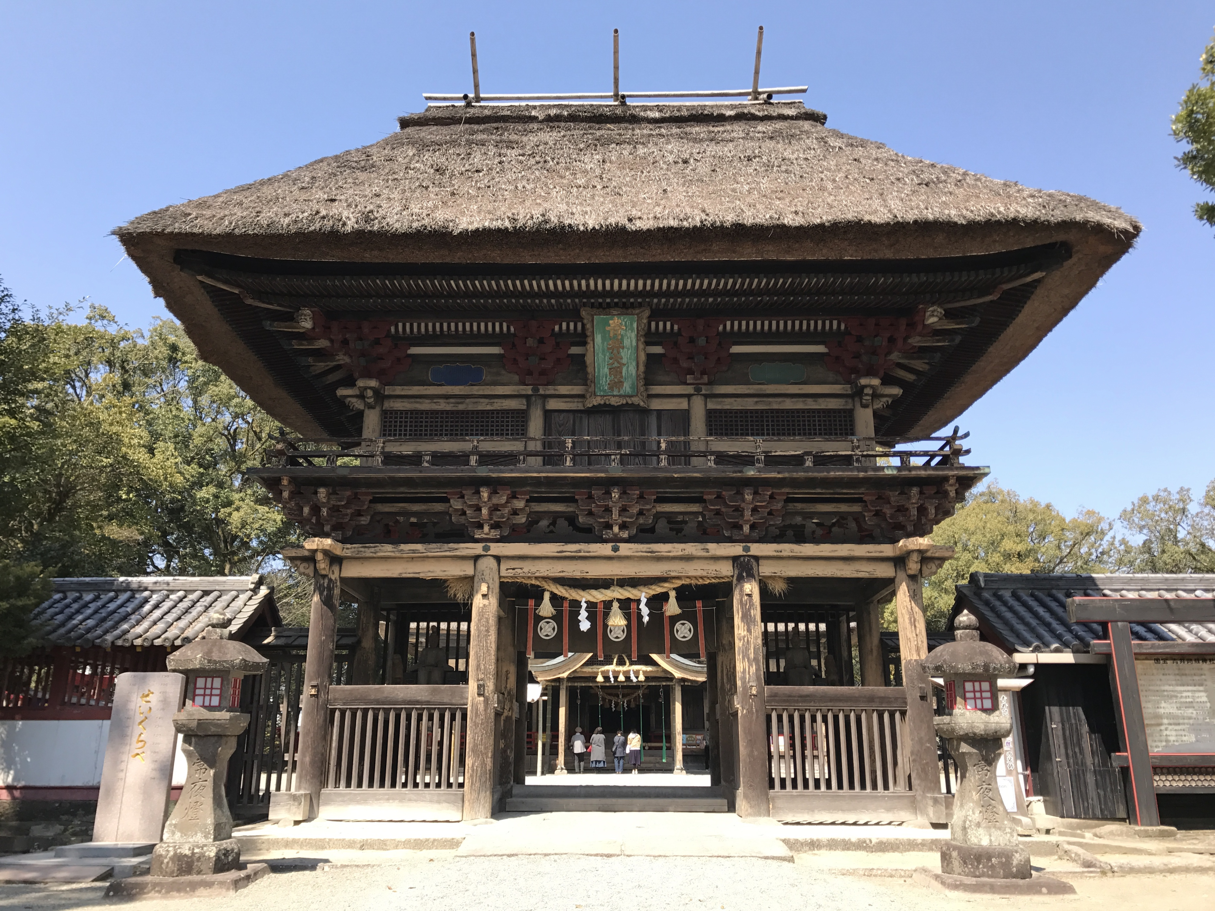 青井阿蘇神社の楼門